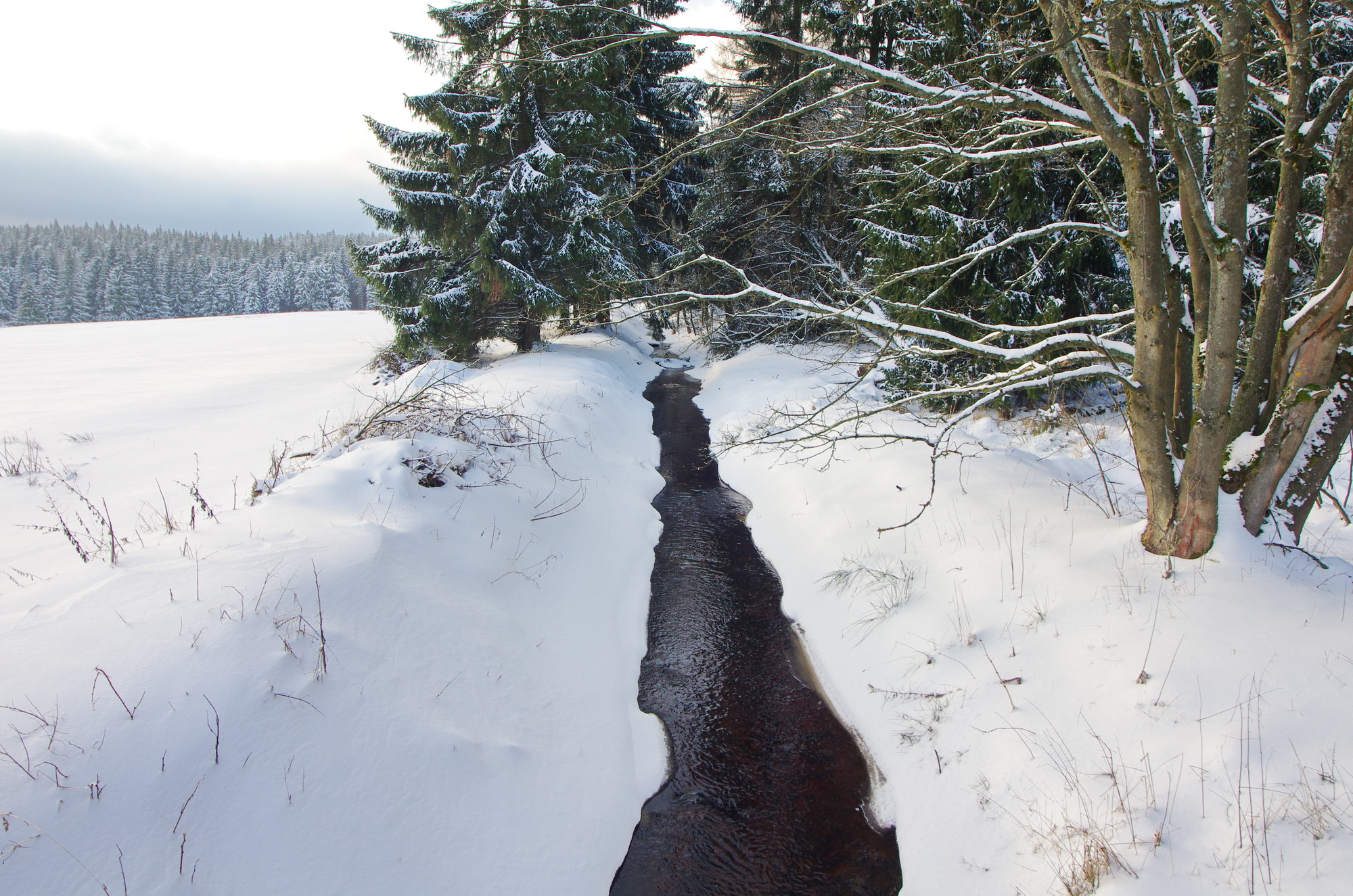 technická památka Dlouhá stoka, v místě nad obcí Prameny, Slavkovský les, okres Cheb